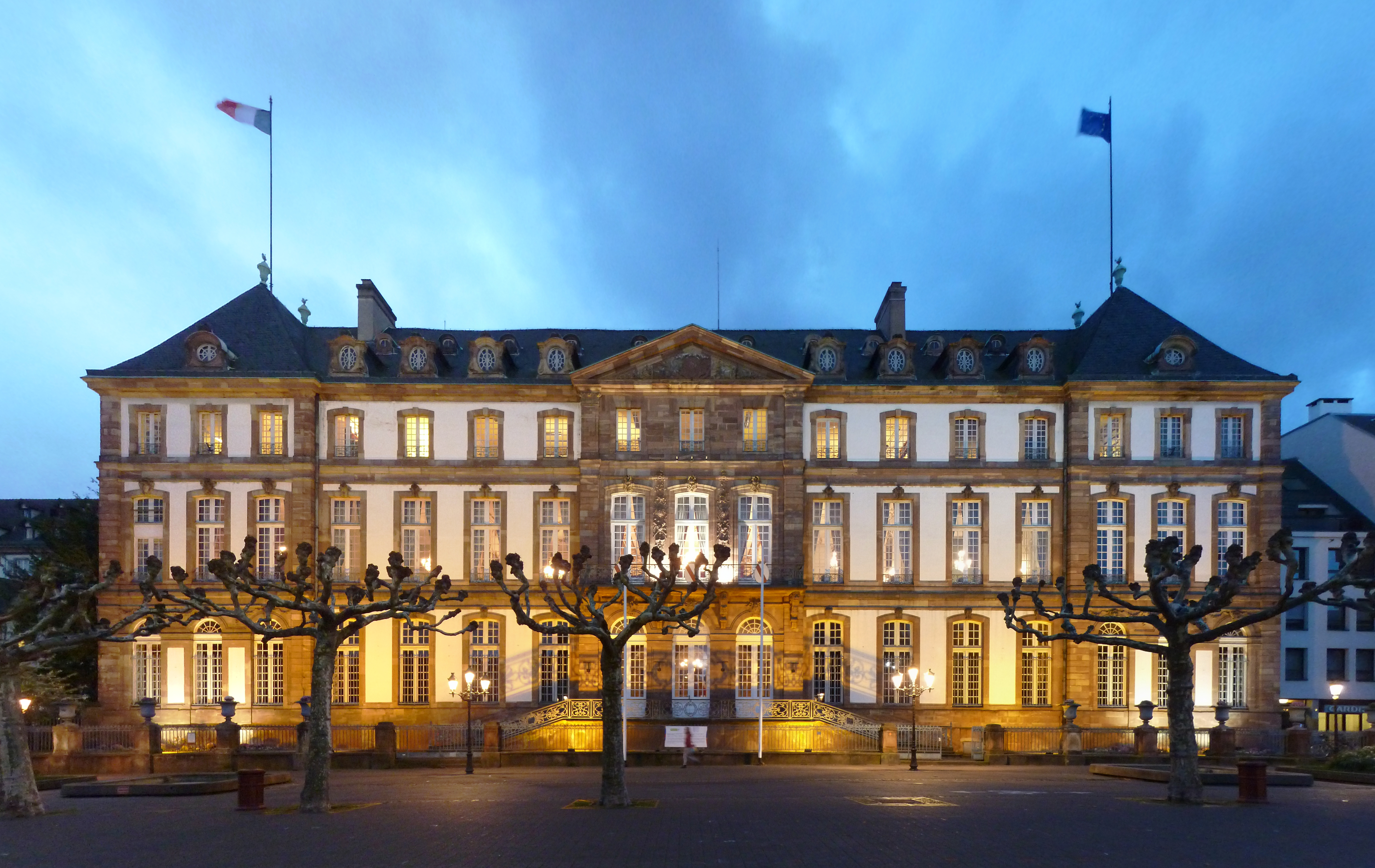 Hôtel de Hanau, hôtel de ville de Strasbourg en octobre 2013.